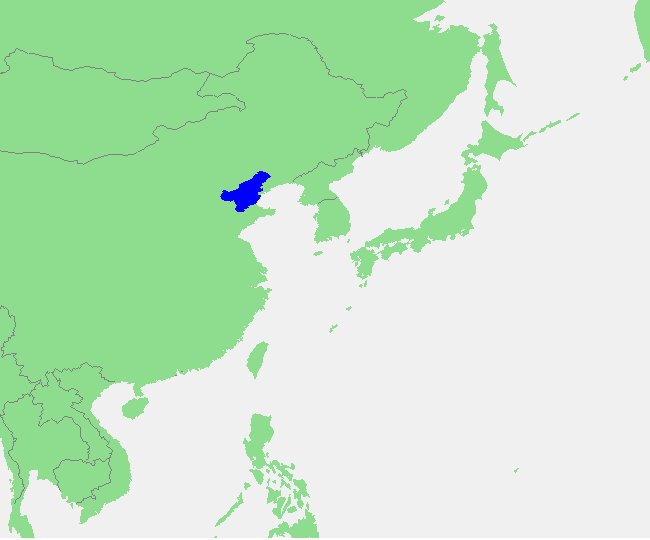 Bohai Sea